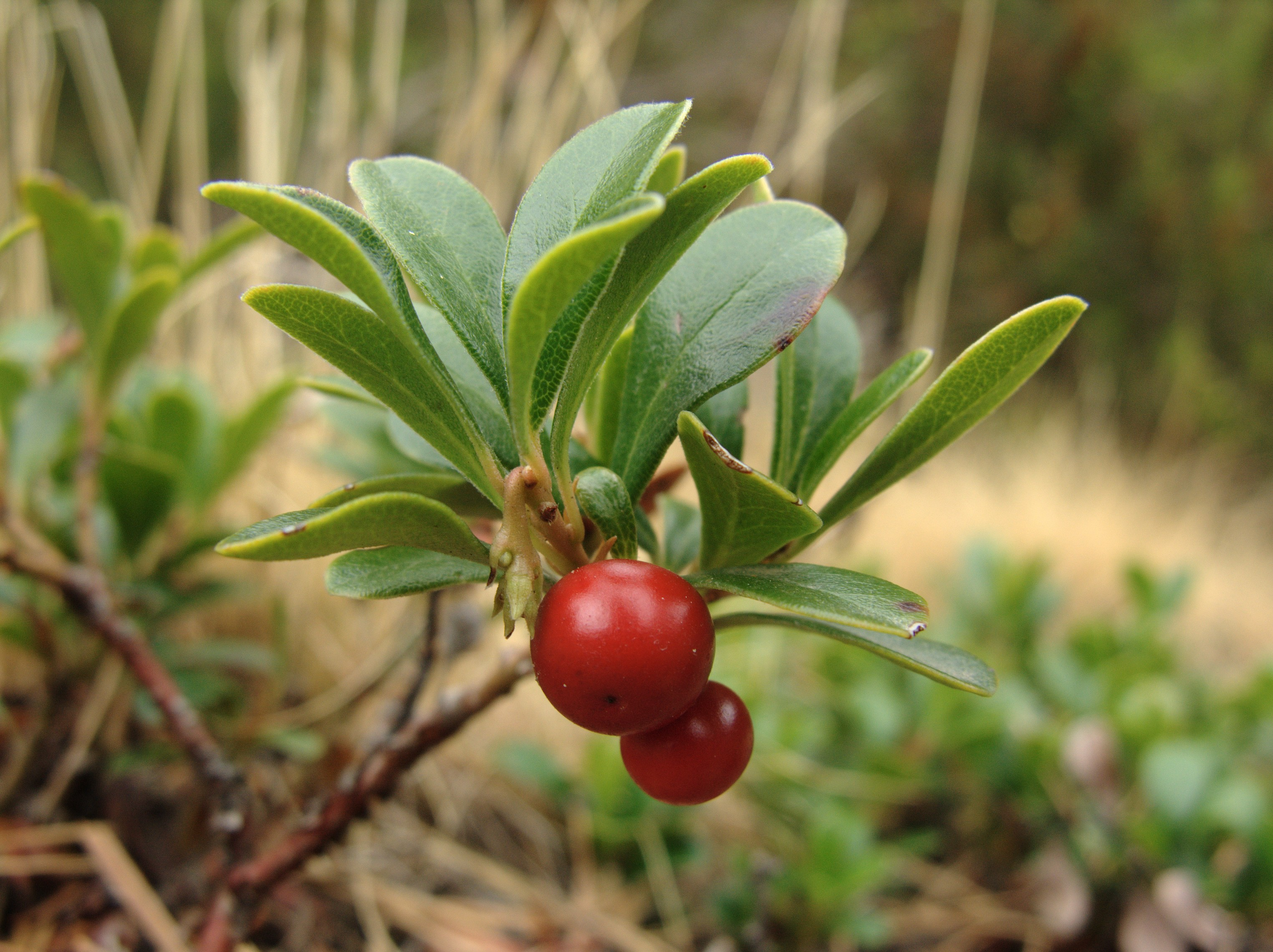 Arctostaphylos uva-ursi (Ericaceae, Ericales). Sierra de Guadarrama, Madrid.